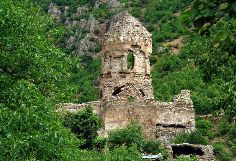 ხანძთა